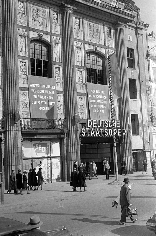 Original image description from the Deutsche Fotothek Porträt: Ernst